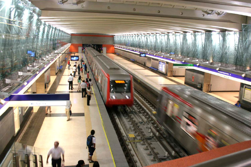 Metro de Santiago